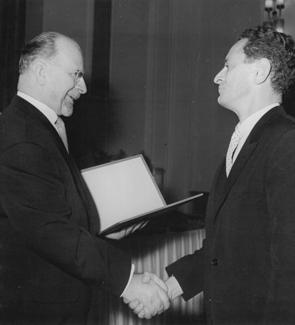 Berlin, Nationalpreis an Dieter Noll Zentralbild Junge 6.10.1963 Nationalpreis 1963 durch Walter Ulbricht verliehen Der Vorsitzende des Staatsrates der DDR, Walter Ulbricht, verlieh am Vormittag des 6.10.1963 in einem feierlichen Zeremoniell aus Anlaß des 14. Jahrestages der Gründung der Deutschen Demokratischen Republik den Nationalpreis 1963 für Kunst und Literatur sowie für Wissenschaft und Technik an 19 hervorragende Persönlichkeiten und elf Kollektive. UBz: Herr Dieter Noll, Berlin, erhielt den Nationalpreis II. Klasse, Kunst und Literatur, für sein literarisches Schaffen, insbesondere für die literarische Meisterung des Wandlungsprozesses einer im faschistischen Geist erzogenen jungen Generation in seinem Romanwerk "Die Abenteuer des Werner Holt", das über die Grenzen unserer Republik Anerkennung errungen hat. Abgebildete Personen: Noll, Dieter: Schriftsteller, DDR (PND 119157322) Ulbricht, Walter: Staatsratsvorsitzender, Erster Sekretär des Zentralkomitees (ZK) der SED, Vorsitzender des Nationalen Verteidigungsrates, DDR